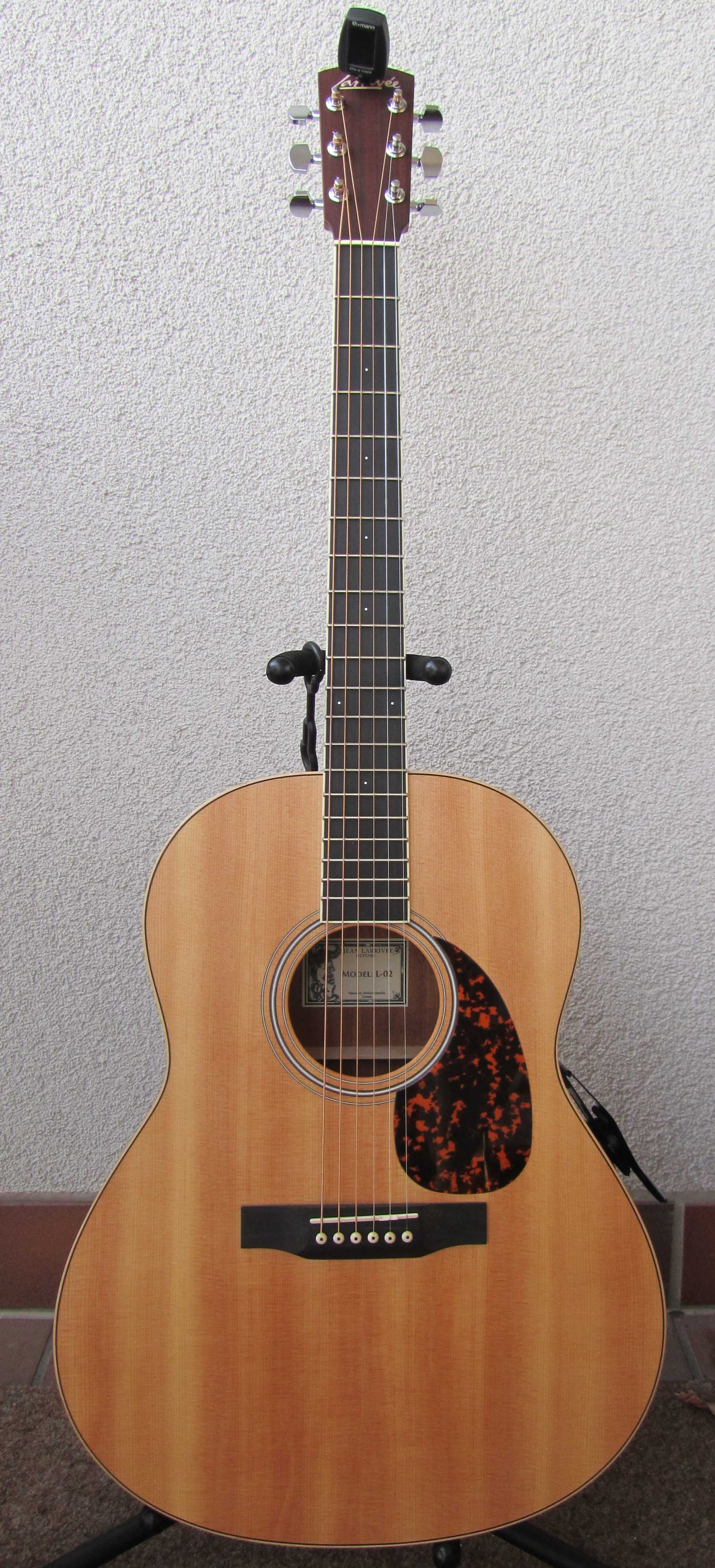 Larrivée-Westerngitarre Modell L-02, eines der Standardmodelle.